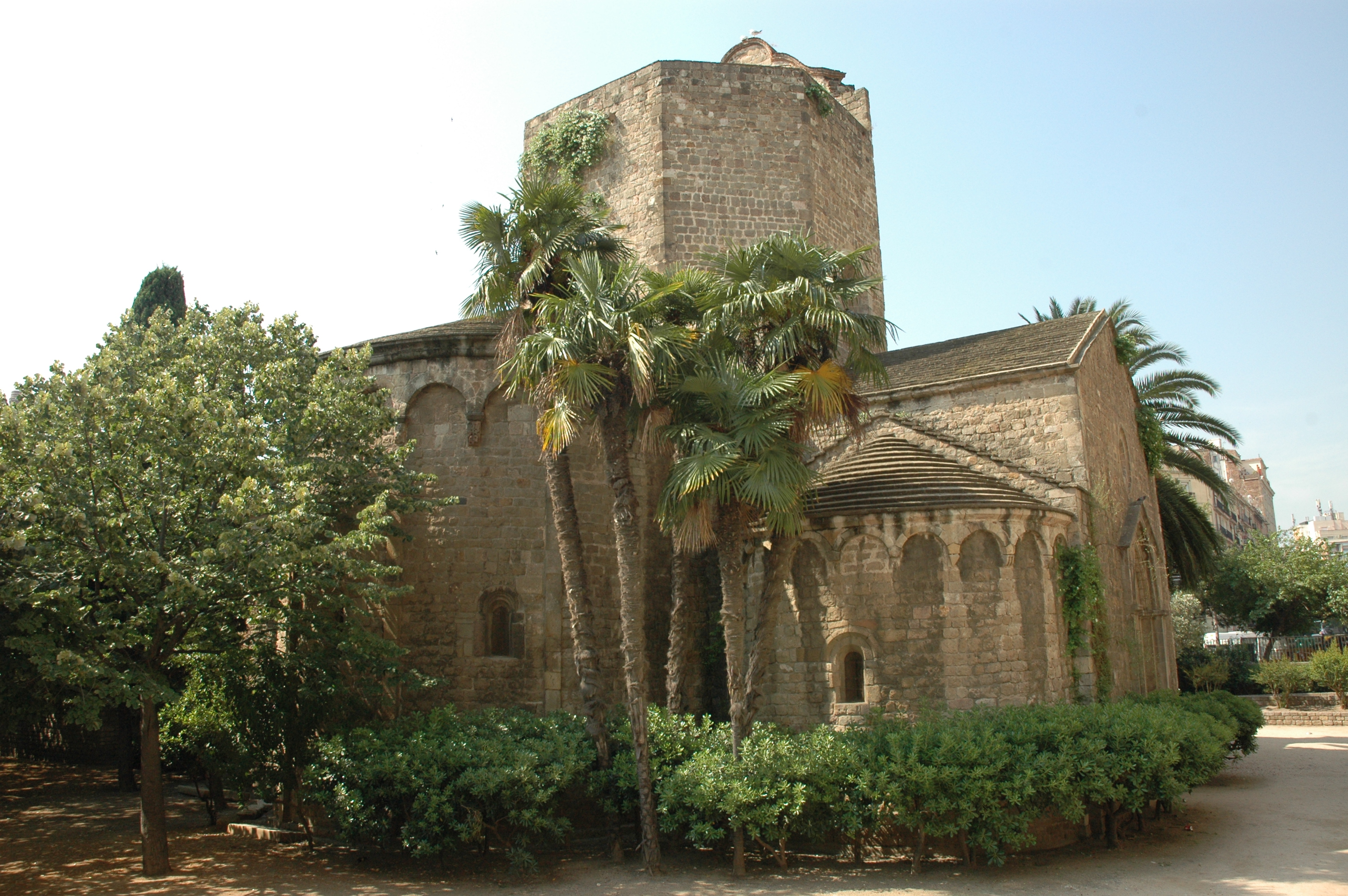 Sant Pau del Camp - Absis